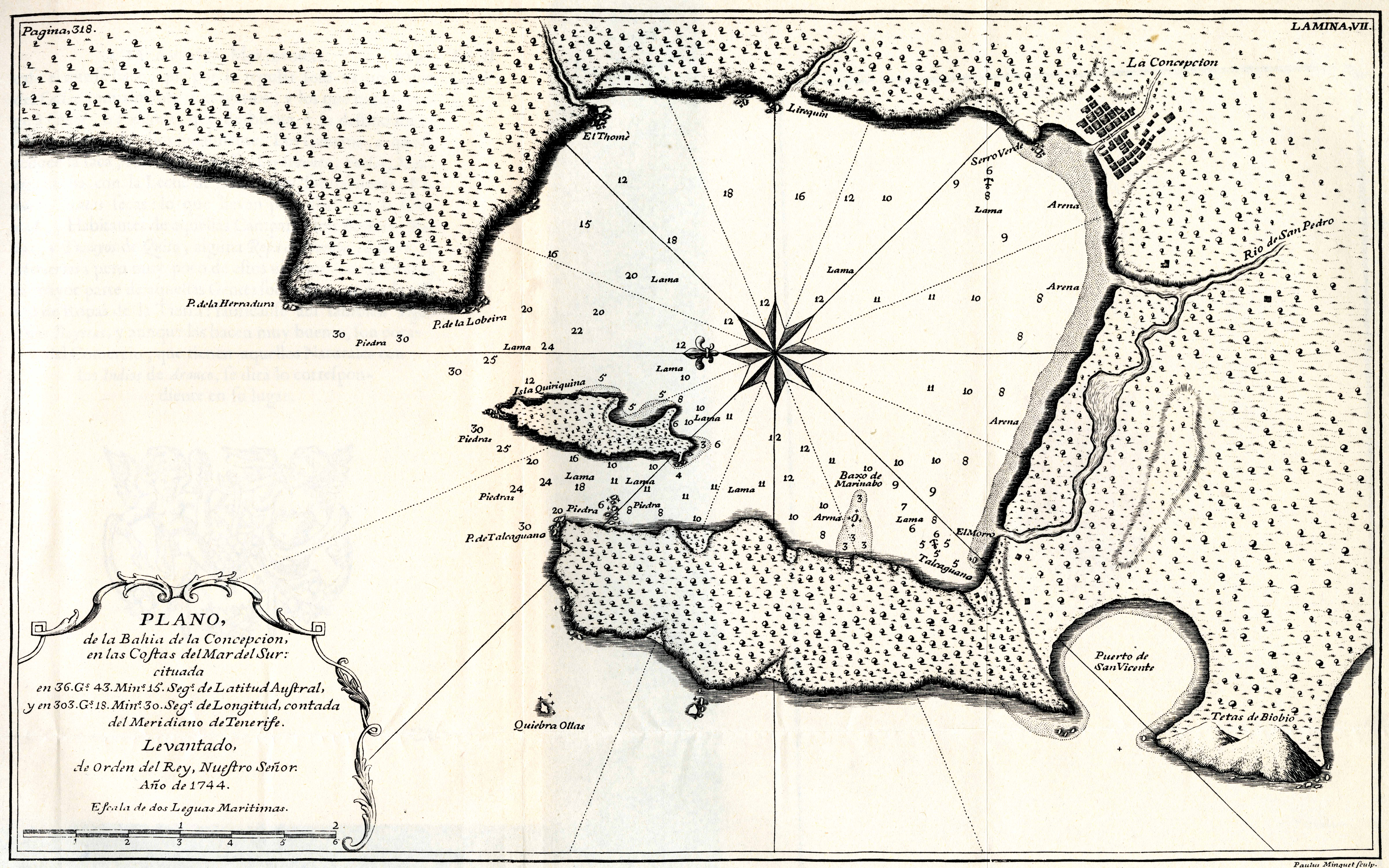 De Ulloa, Antonio y Jorge Juan. Relación Histórica del Viaje a la América Meridional, hecho de Orden de Su Majestad Católica para medir algunos Grados de Meridiano Terrestre, y venir por ellos en conocimiento de la verdadera Figura y Magnitud de la Tierra, con otras varias Observaciones Astronómicas y Físicas. Por Don Jorge Juan Comendador de Aliaga, en la Orden de San Juan, Socio correspondiente de la Real Academia de las Ciencias de París y Don Antonio de Ulloa de la Real Sociedad de Londres: ambos Capitanes de Fragata de la Real Armada. Segunda Parte / Tomo II. Impresa por la Orden del Rey Nuestro Señor en Madrid por Antonio Marín, Año de MCDDXLVIII (1748). Diapositiva de Consulta y acceso publico cuya información fue investigada de un libro y/o ejemplar de revisión custodiado en los Fondos Bibliográficos (Sección Siglo XVIII o Etapa Colonial) del Archivo Histórico del Guayas; Guayaquil, Ecuador